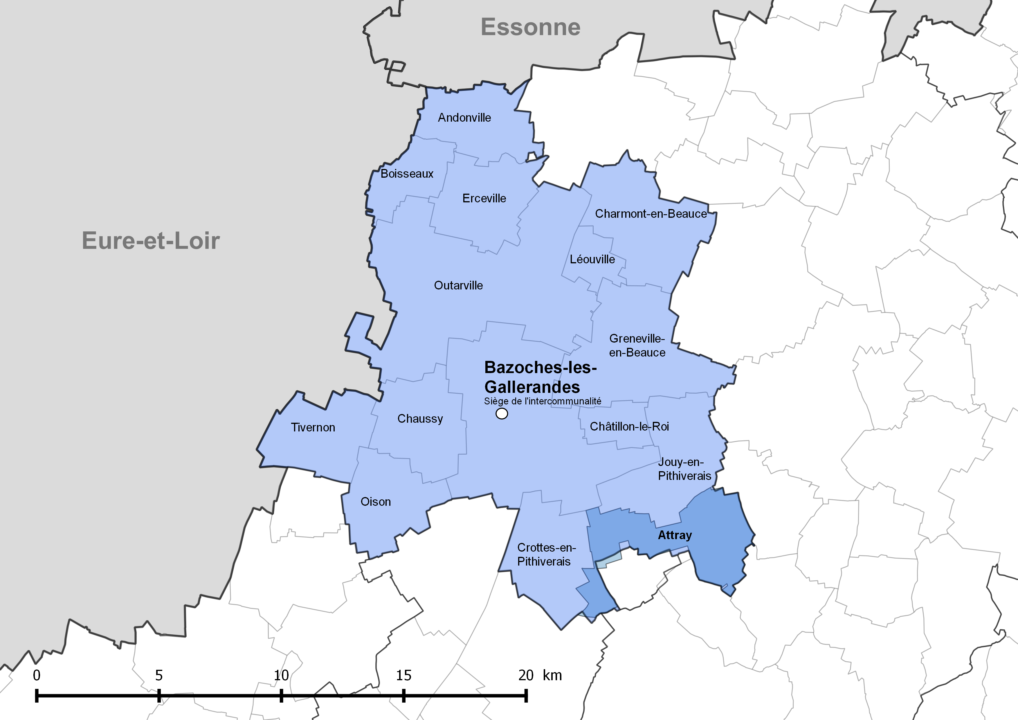 Périmètre de la communauté de communes de la Plaine du Nord Loiret - Situation de la commune de Attray.